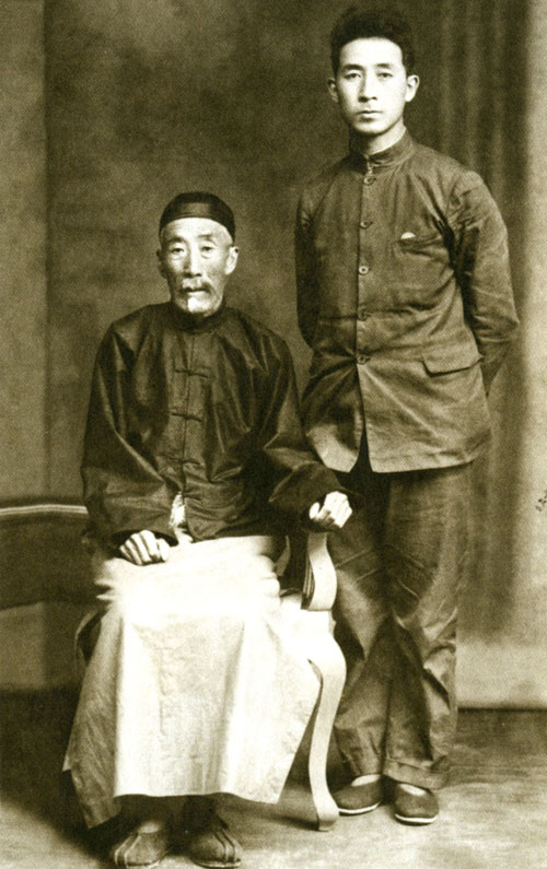 薄一波年轻时与父亲合影